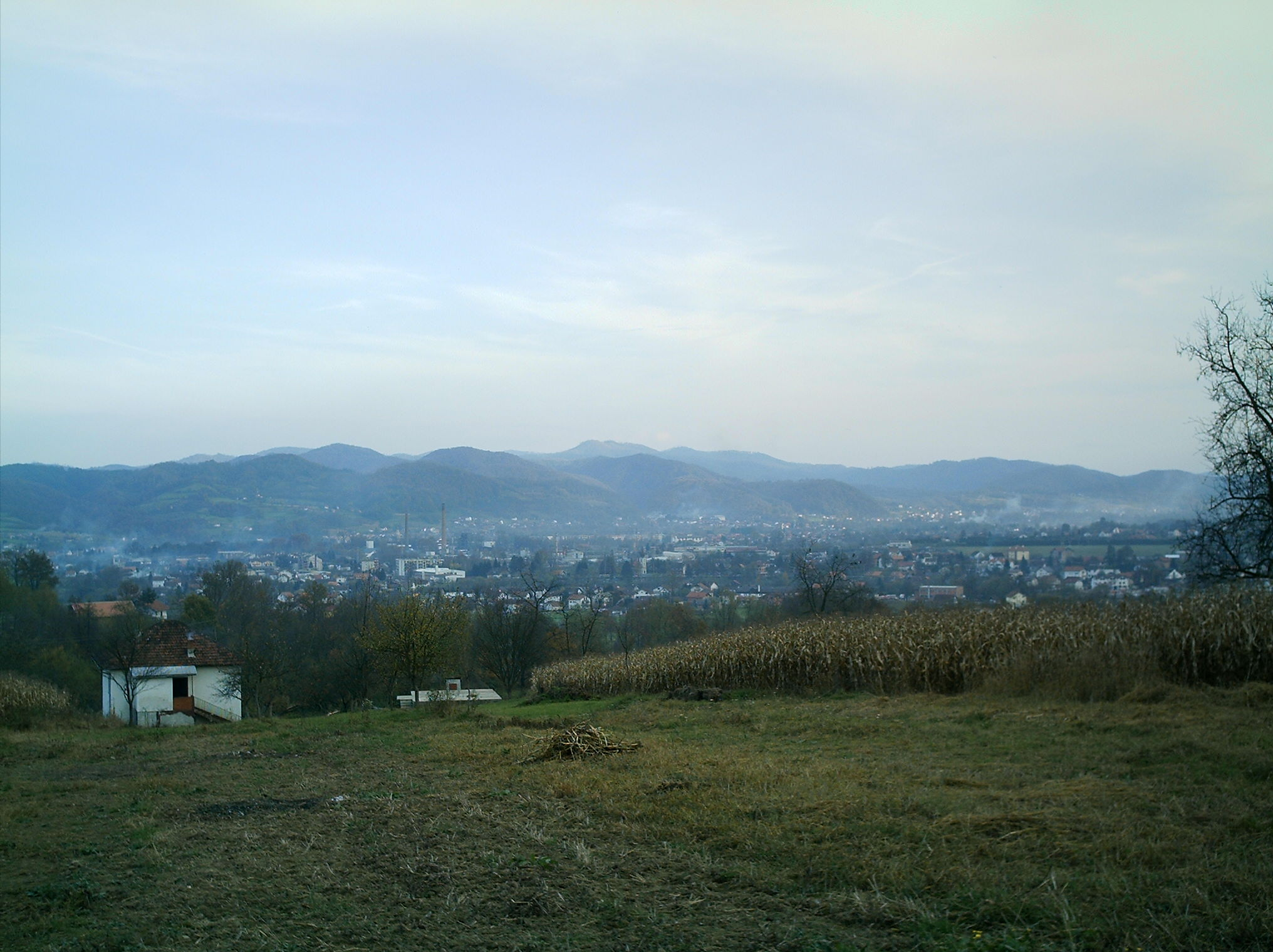 Поглед са брда Крстова Гора на град Теслић